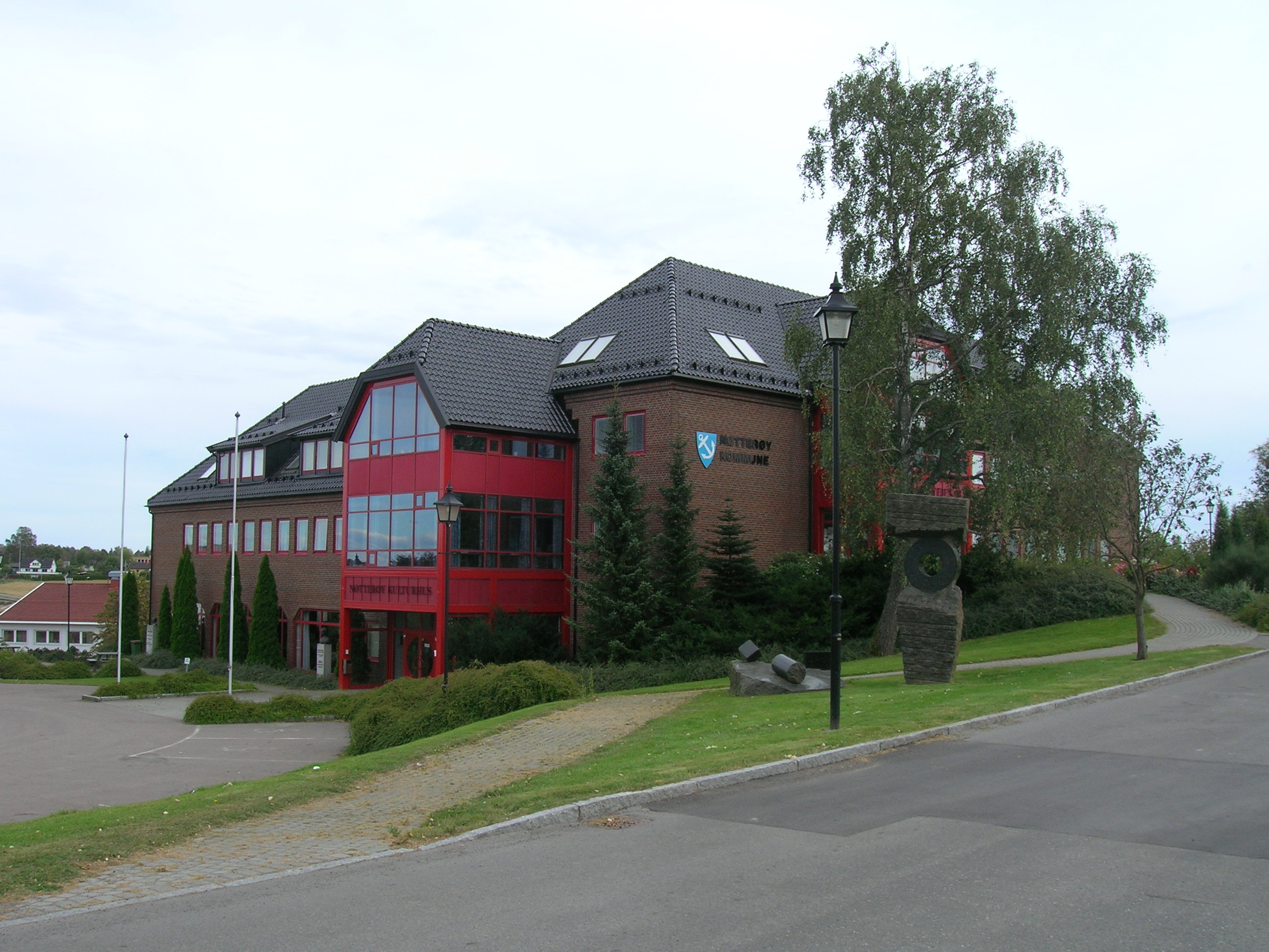 Nøtterøy kulturhus